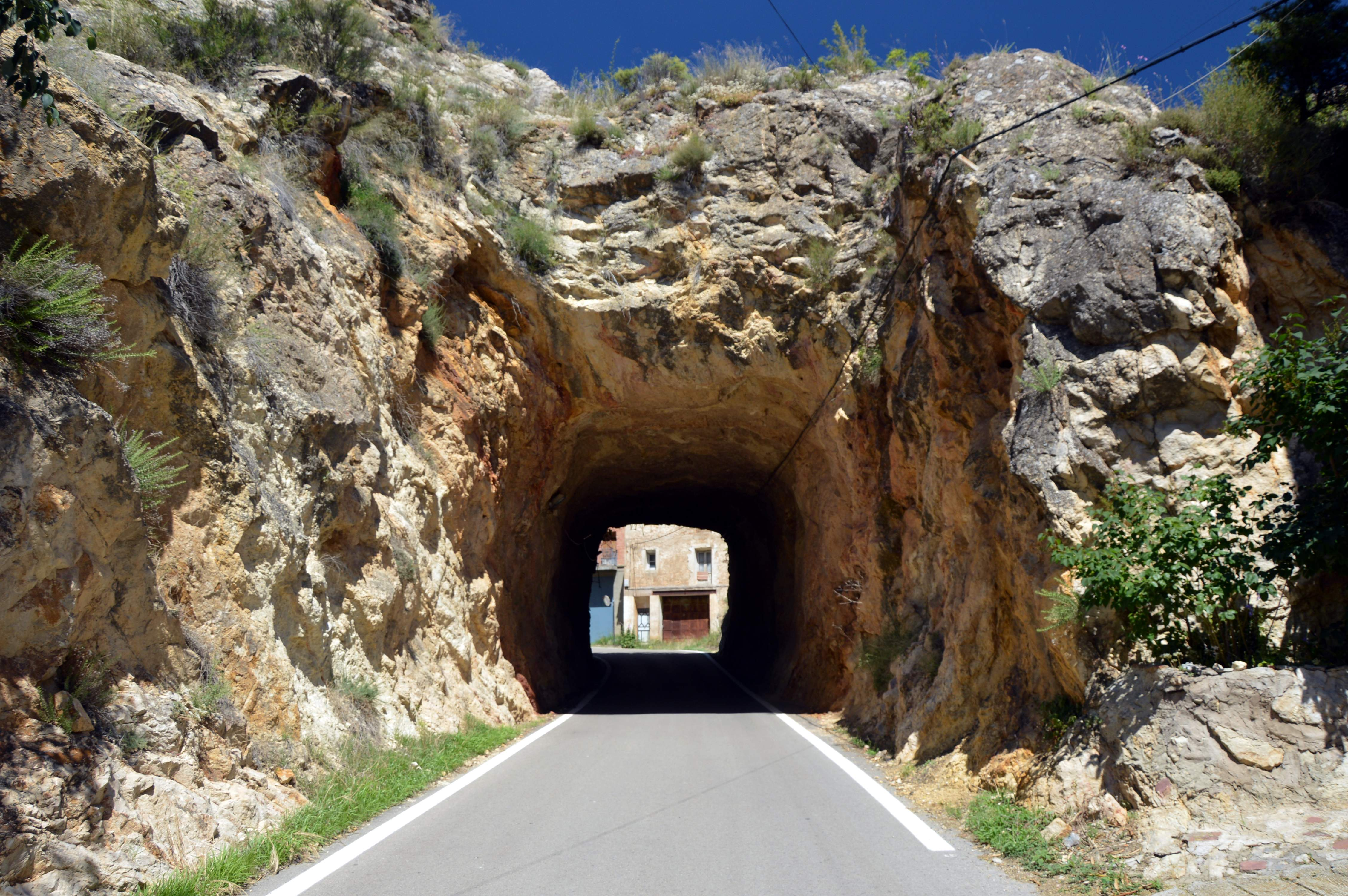 Detalle de la entrada al túnel de La Solana en Castielfabib (Valencia), 2018.